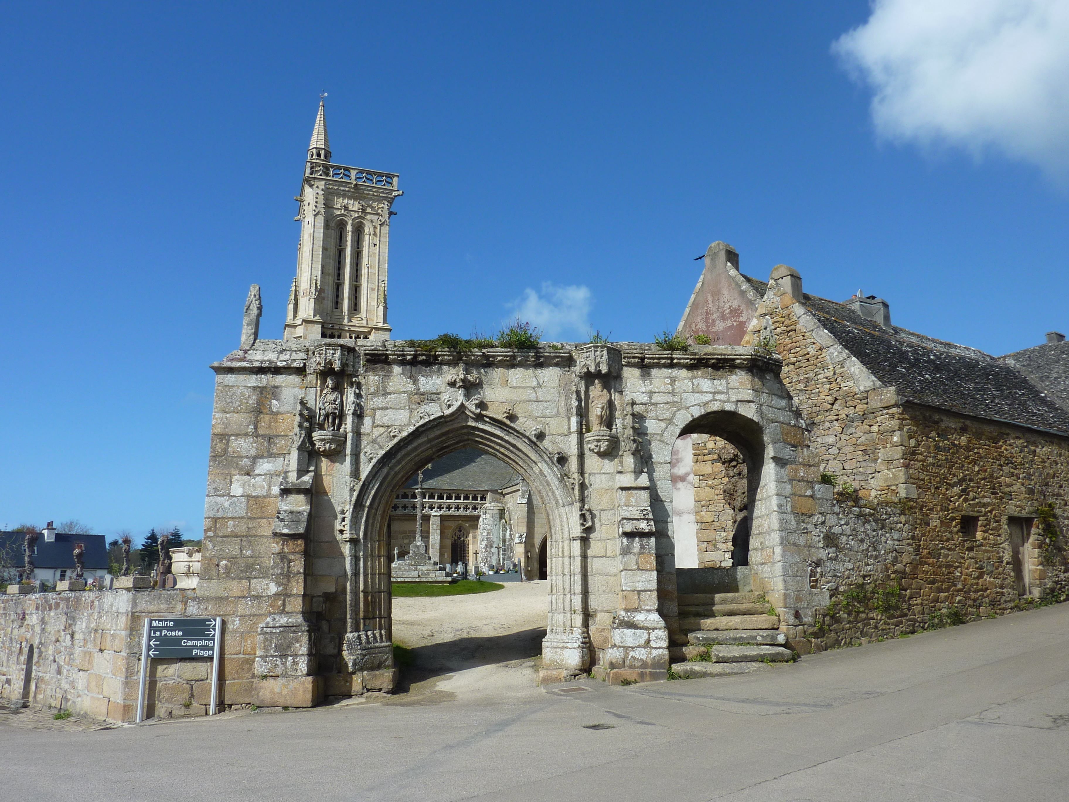 Saint-Jean-du-Doigt : enclos paroissial, l'arc de triomphe